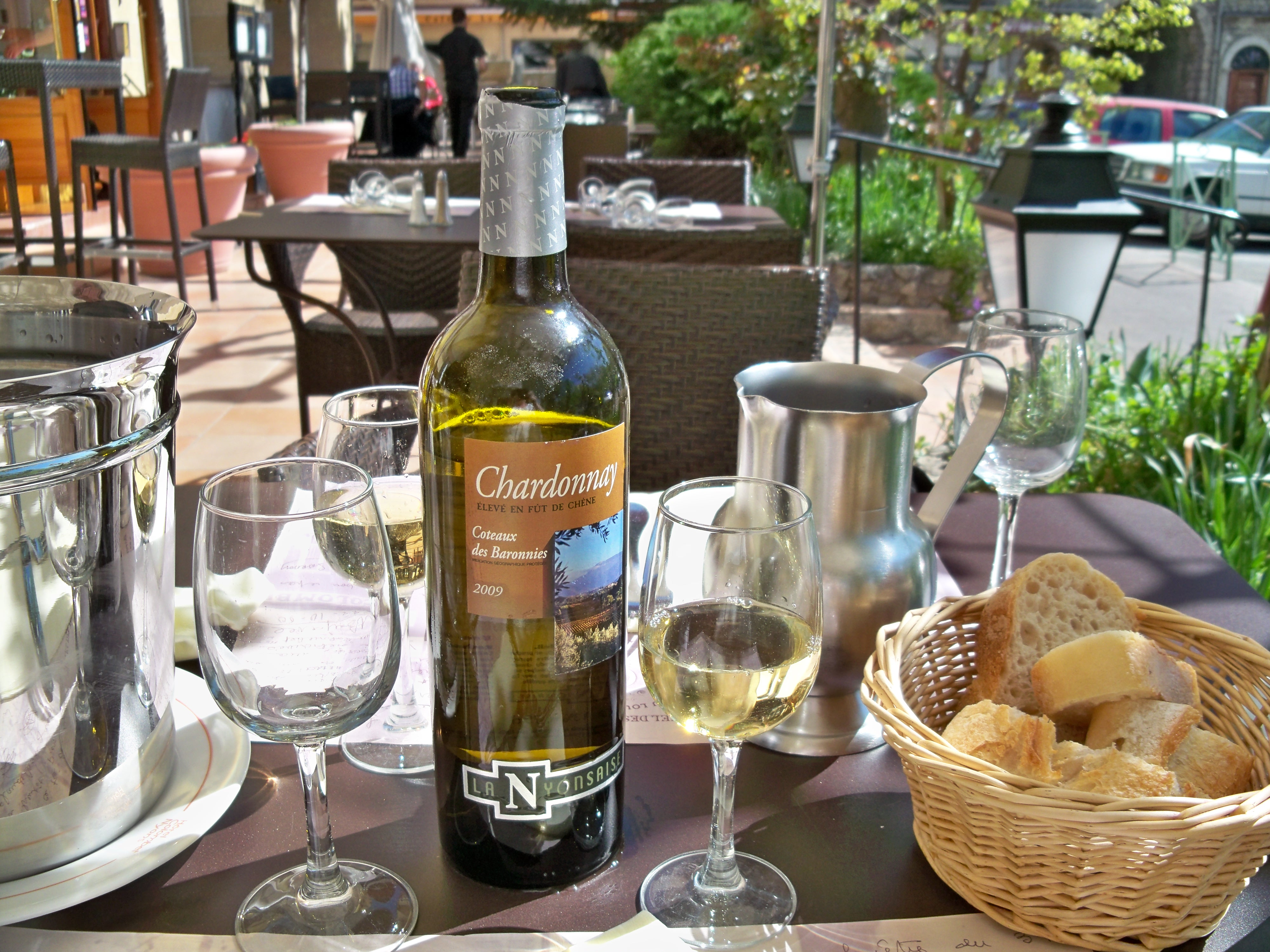 Bouteille de Coteaux des Baronnies blanc